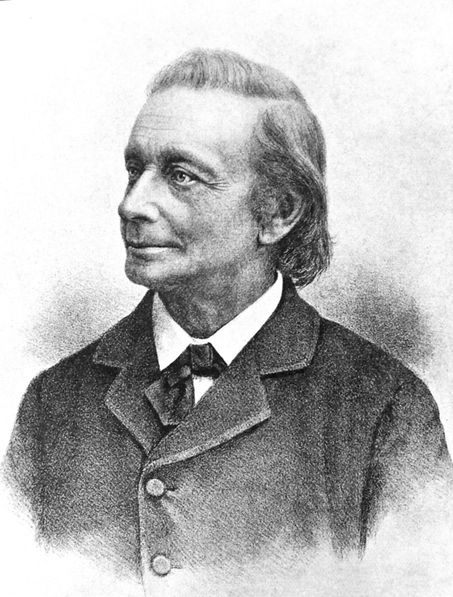 Jens Christian Hostrup (20. maj 1818 - 21. november 1892), dansk forfatter, dramatiker og præst. Født i København. Student ved Metropolitanskolen i 1837, og blev i 1843 cand.theol.